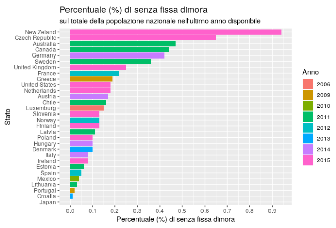 file realizzato con RStudio con i seguenti dati OCSE